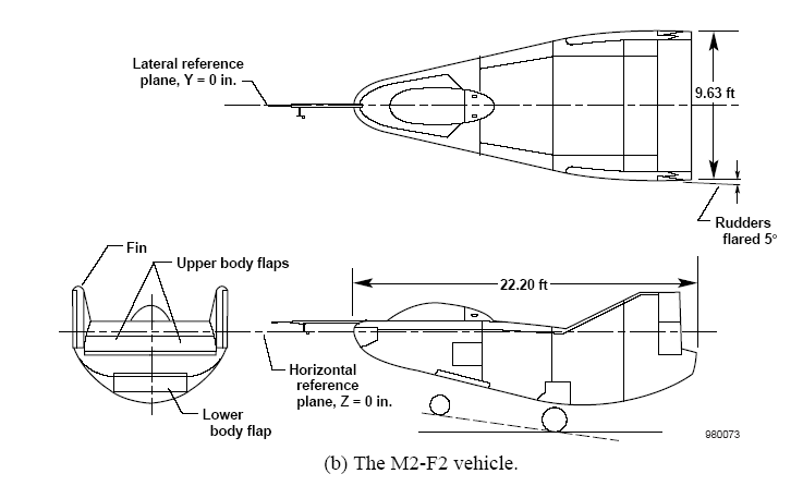 NASA M2-F2 3 view diagram